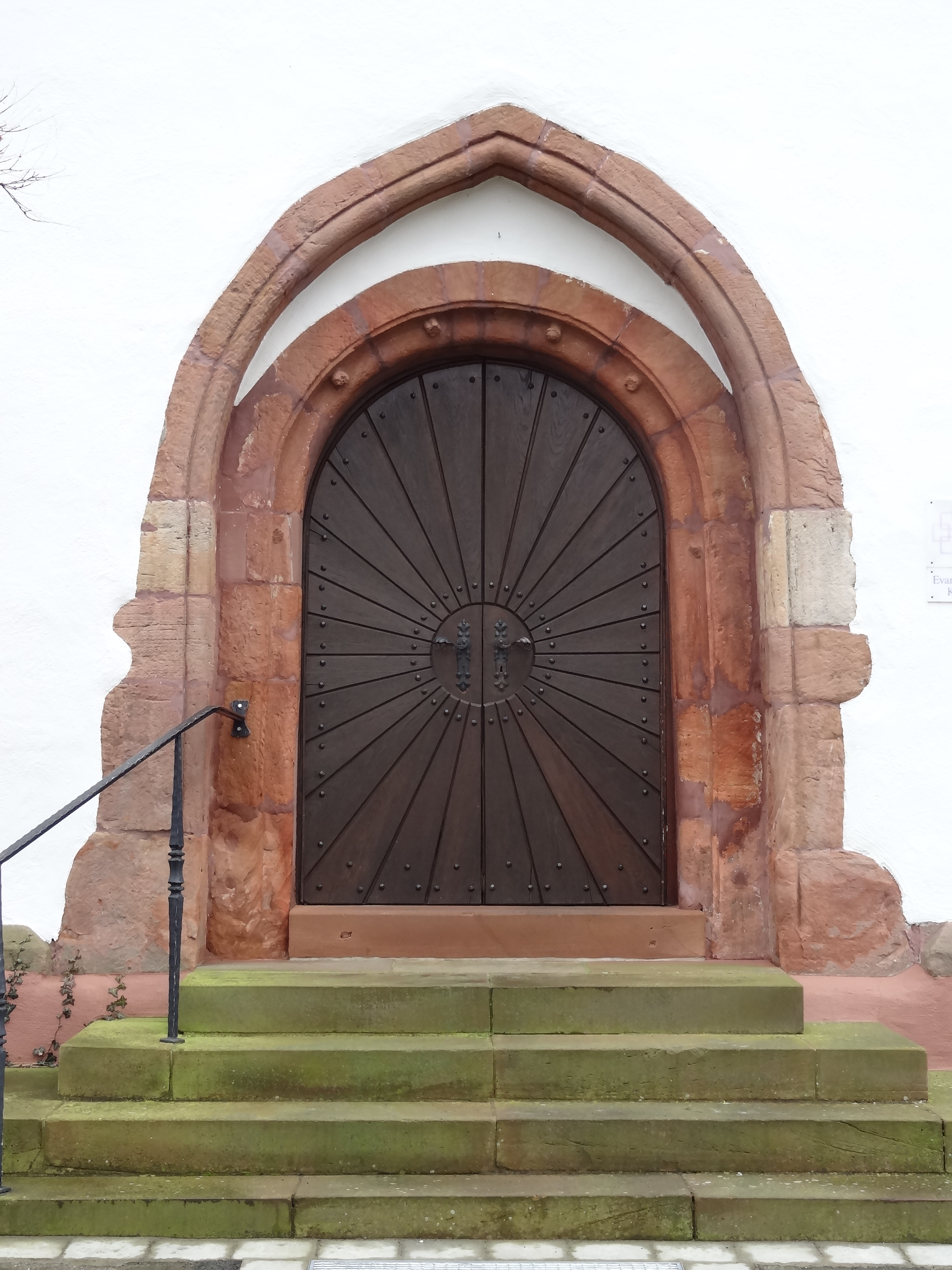 Evangelische Pfarrkirche (Eichelsdorf, Nidda)